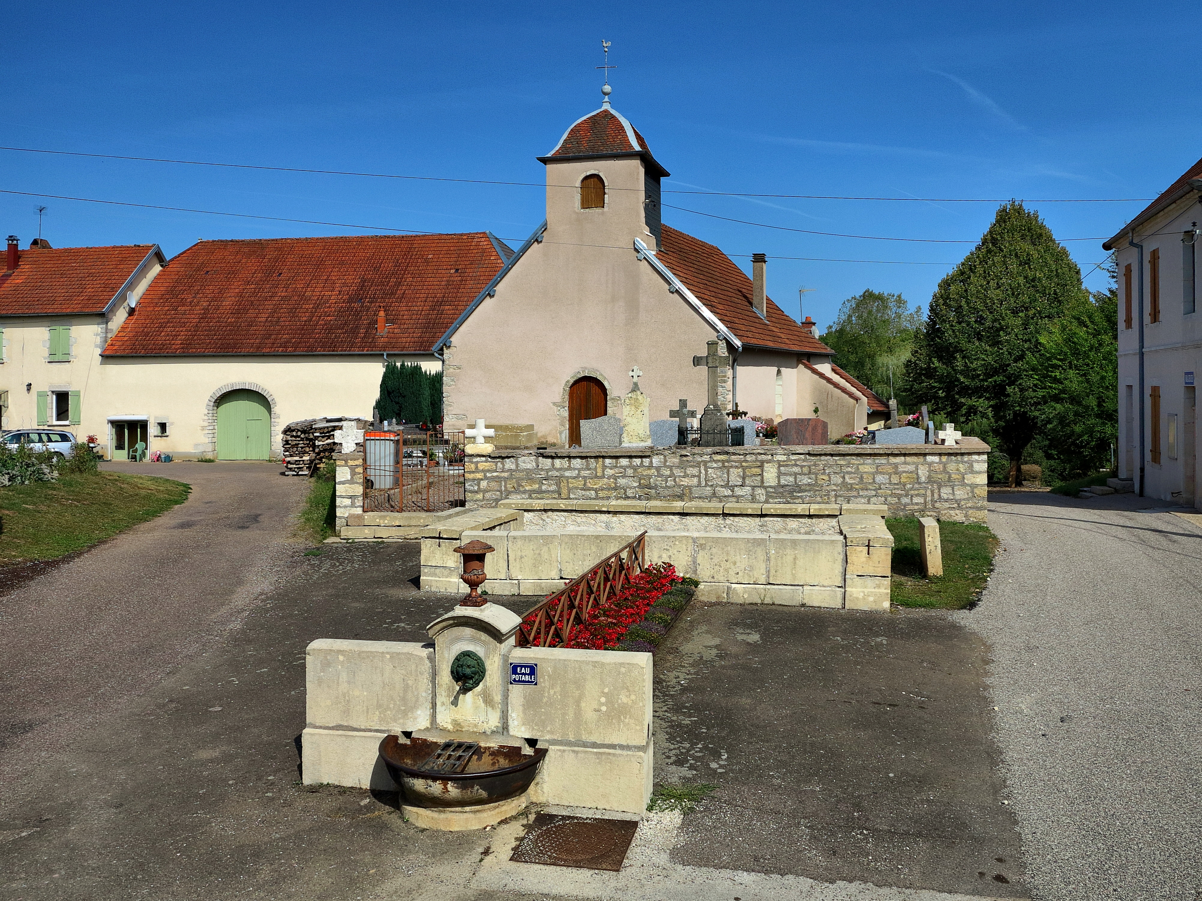 La fontaine et l'église